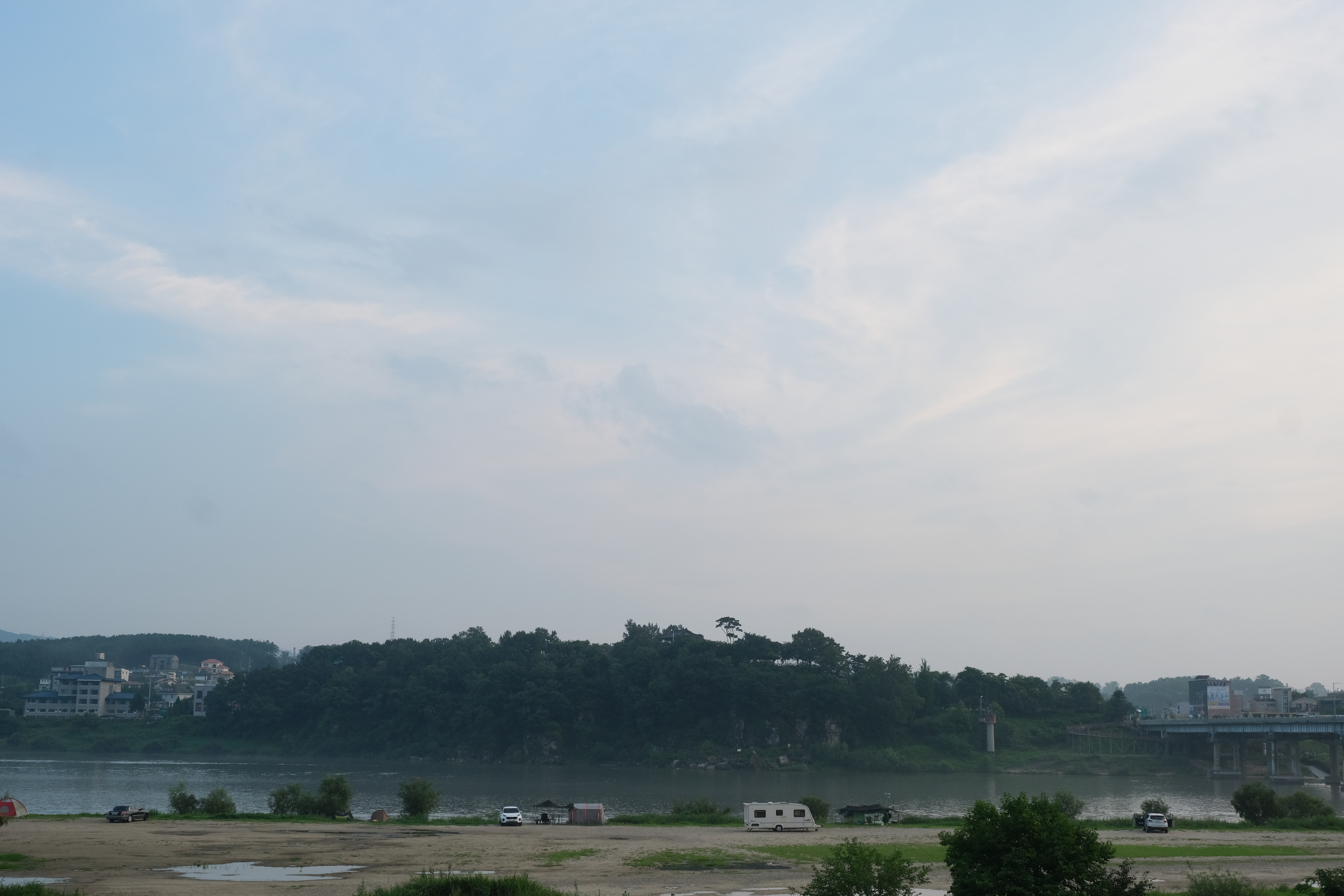 Namhan River in front of Yeoju Library